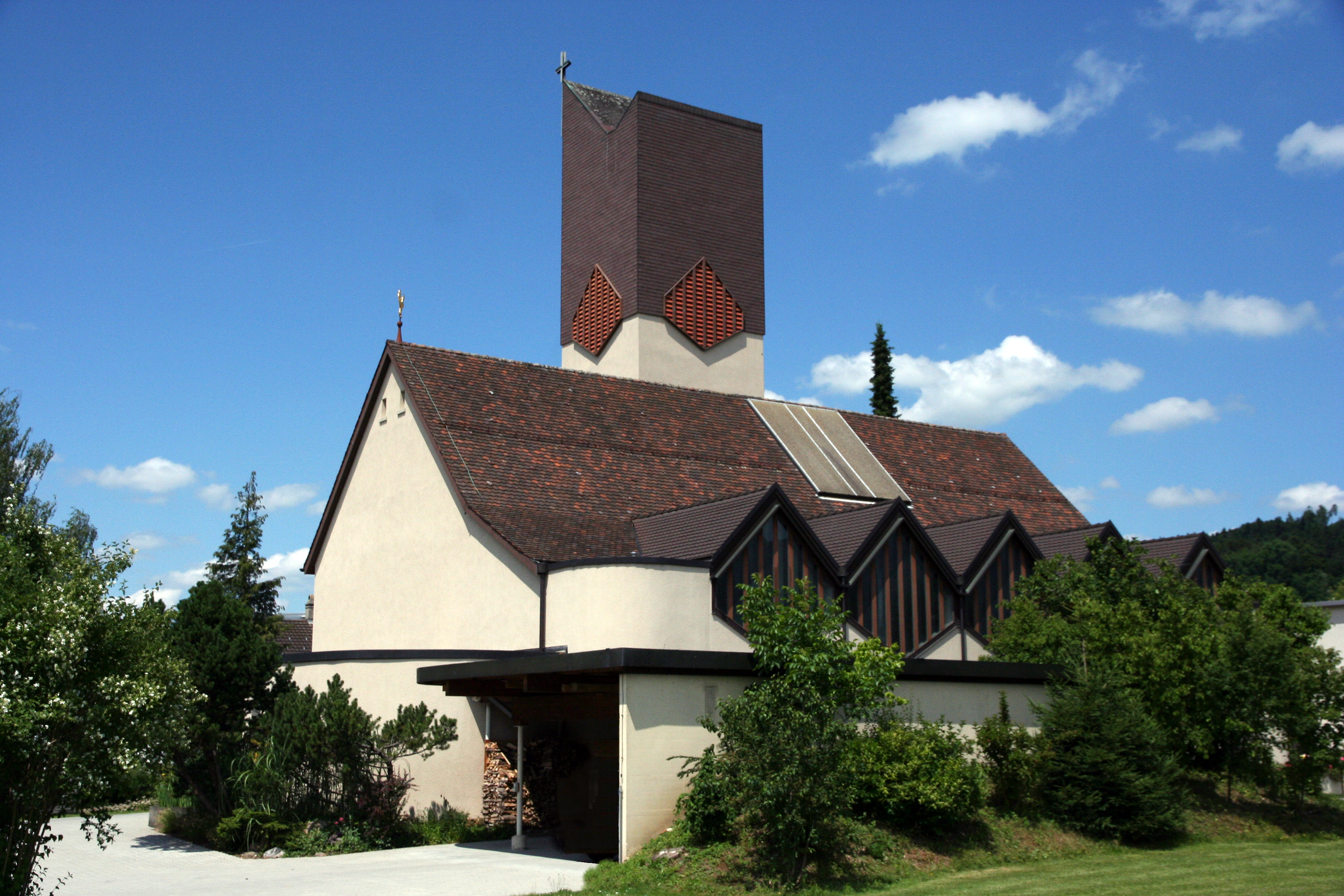 Römisch-katholische Pfarrkirche Liebfrauen Hinwil, Aussenansicht von Süden